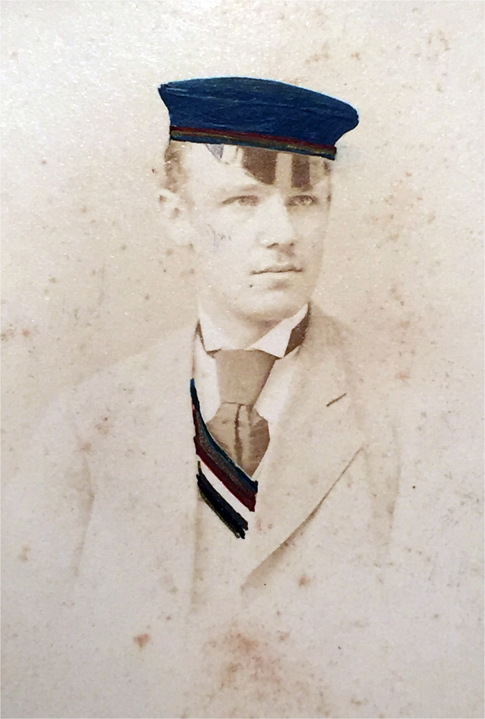 Porträtfotografie von Richard Müller. Damals trugen die aktiven Lausitzer eine dunkelblaue Tellermütze. Das zweite Band ist offenbar später eingefügt worden. Es soll das Band der Suevia Heidelberg sein, schwarz-gelb-weiß von unten. Das Gelb ist durch spätere Verfärbung untergegangen.